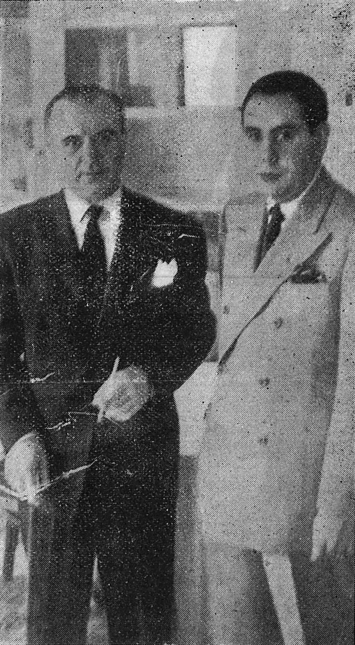 El pianista José Iturbi junto al periodista aficionado Antonio Balanzá en Valencia, 1948